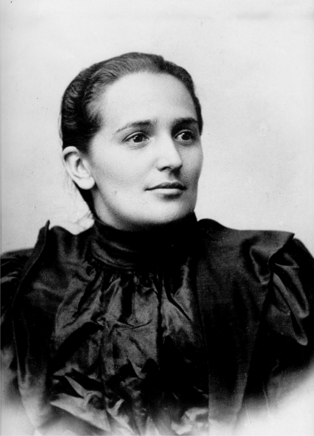 La santa Maria de Jesus Montoya Upegui